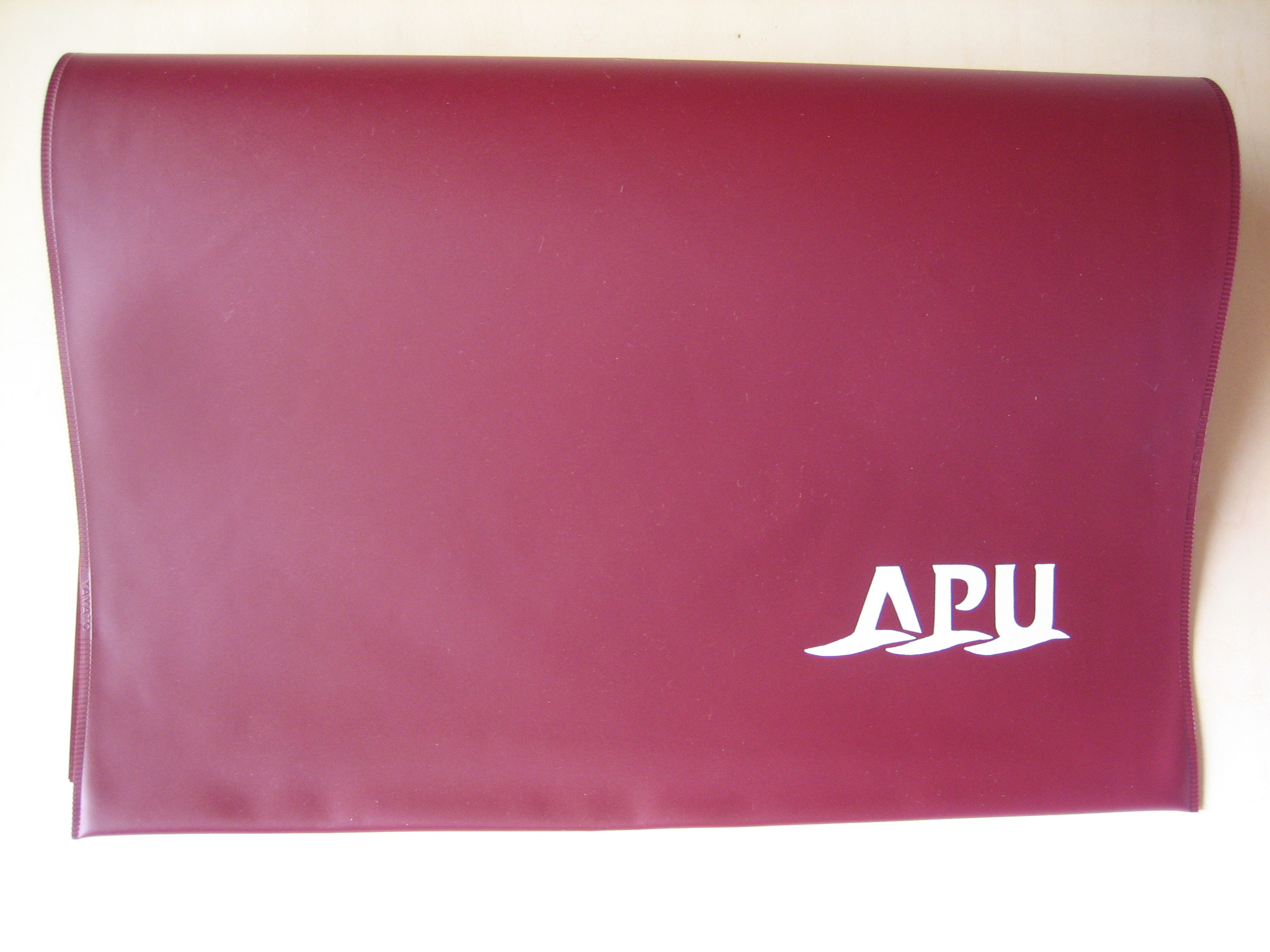 アジア太平洋大学で販売されるクラッチバッグの画像です。